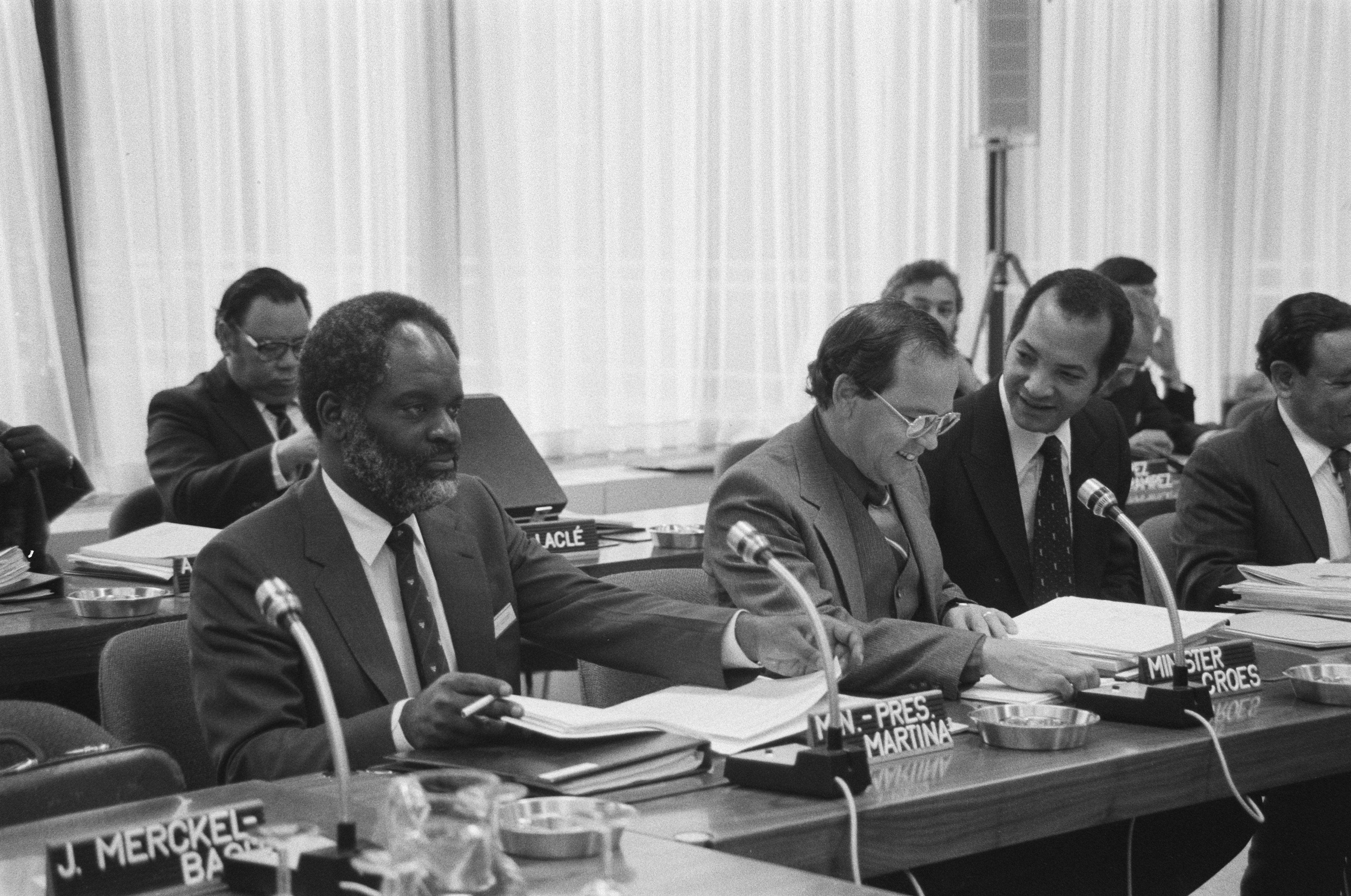 Collectie / Archief : Fotocollectie Anefo Reportage / Serie : [ onbekend ] Beschrijving : Ronde-tafel-conferentie, politieke besprekingen toekomstige staatkundige structuur Nederlandse Antillen. Vlnr. Don Martina, Betico Croes, De Castro Datum : 17 februari 1981 Locatie : Den Haag, Zuid-Holland Trefwoorden : conferenties, ministers Persoonsnaam : Castro De, Croes Betico, Martina, Don Fotograaf : Dijk, Hans van / Anefo Auteursrechthebbende : Nationaal Archief Materiaalsoort : Negatief (zwart/wit) Nummer archiefinventaris : bekijk toegang 2.24.01.05 Bestanddeelnummer : 931-3268